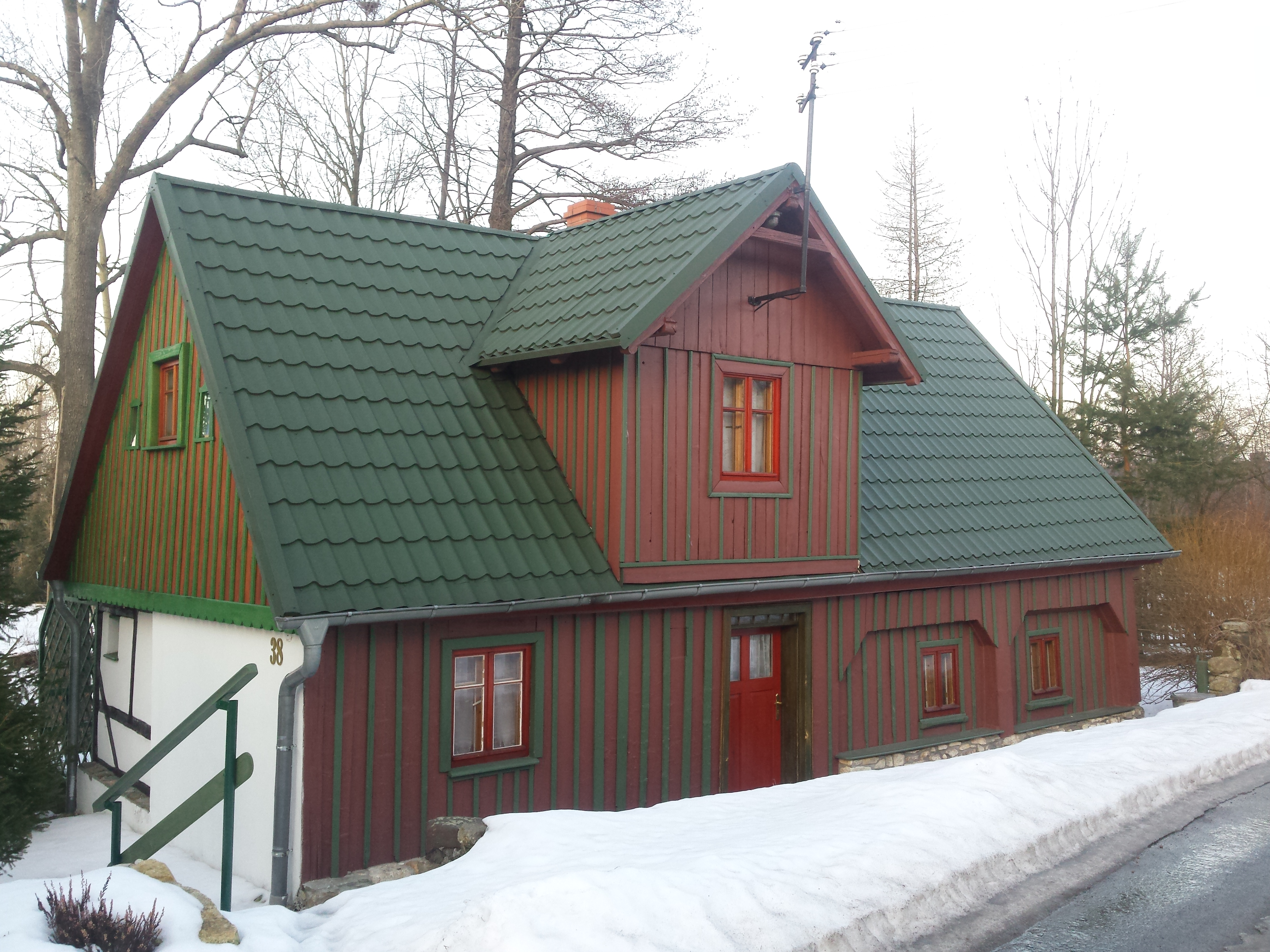 Zabytkowy dom nr 38 Kwieciszowicach.